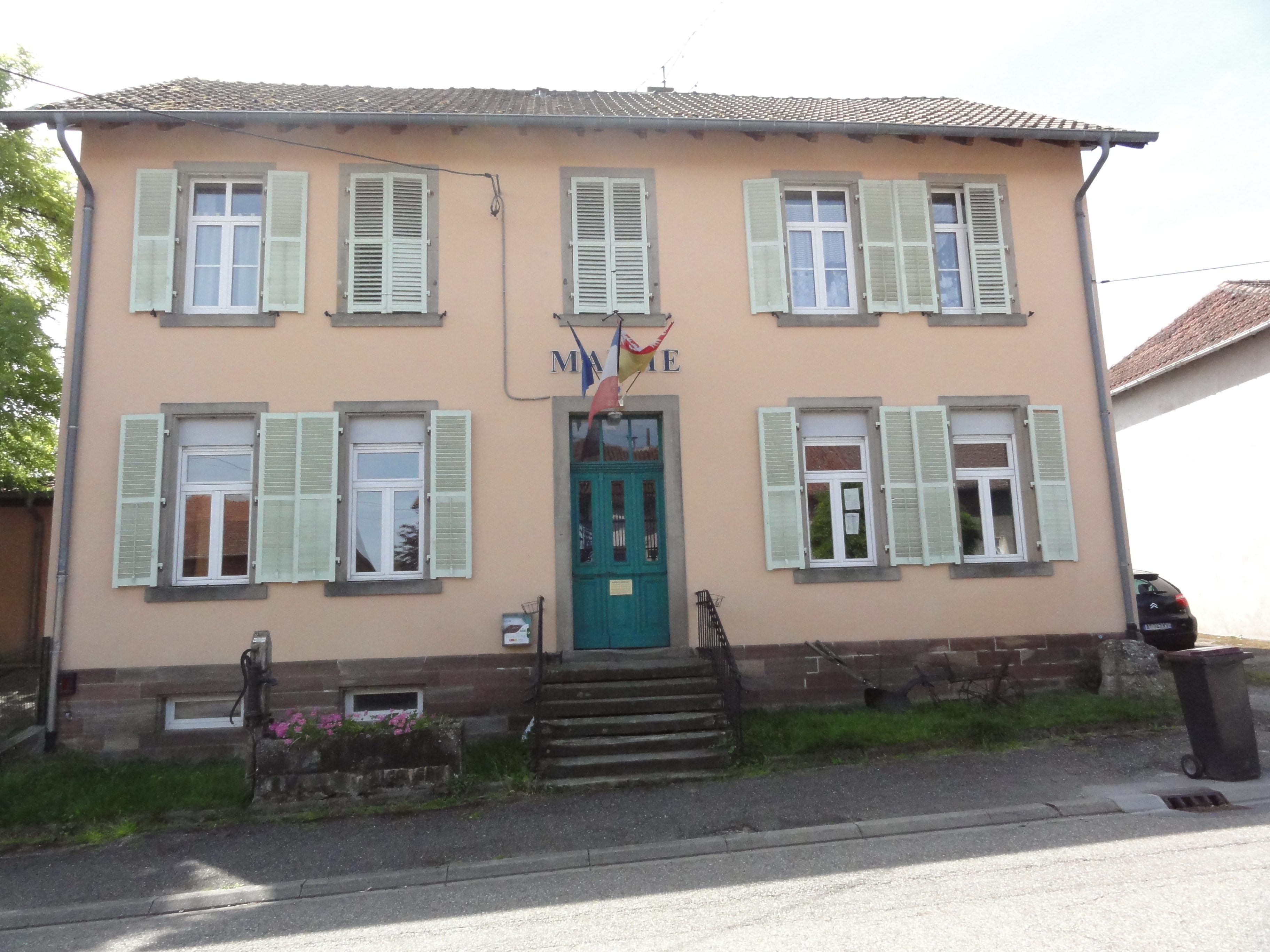 Desseling (Moselle) mairie